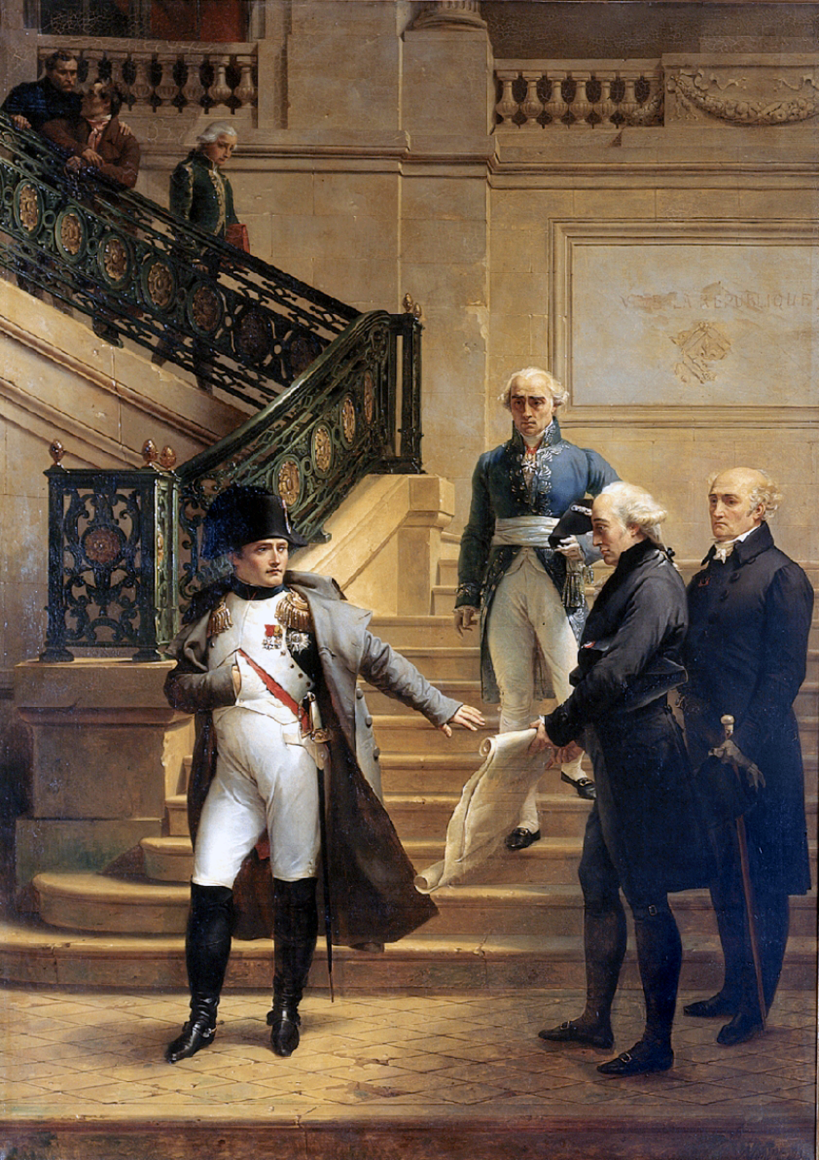 Visite de Napoléon au Palais-Royal le 19 août 1807, Palais-Royal où siégeait le Tribunat, assemblée consultative qui venait d’être supprimée. L’homme en habit bleu est Jean-Pierre Fabre, dit Fabre de l’Aude, le président du Tribunat. Napoléon, fâché de sa présence, quitte le palais en repoussant les plans d’aménagement proposés par les deux architectes à droite (Beaumont et Fontaine).Depicted people: Napoléon, Jean-Pierre Fabre, Beaumont and Pierre Fontaine